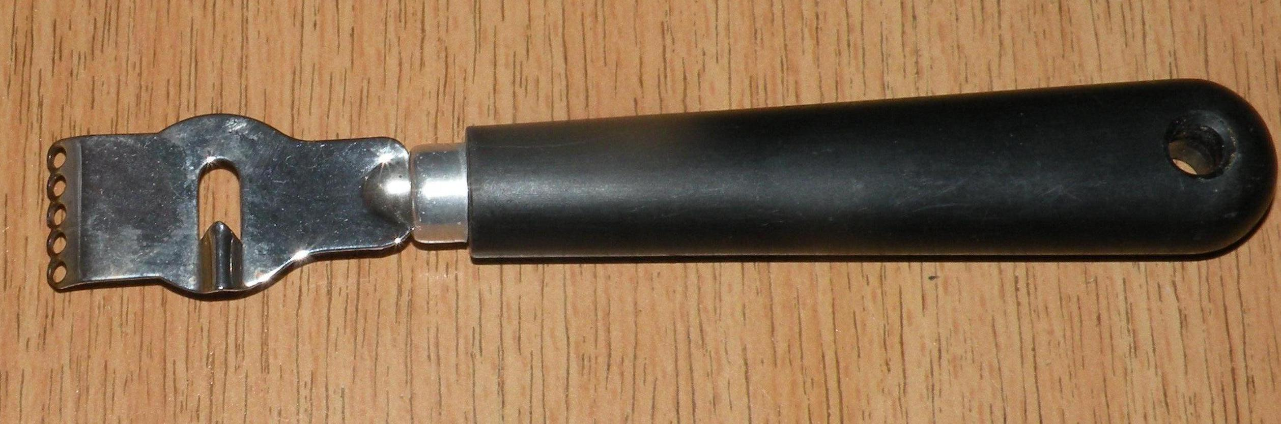 ustensil de cuisine servant à faire des zest de fruit.